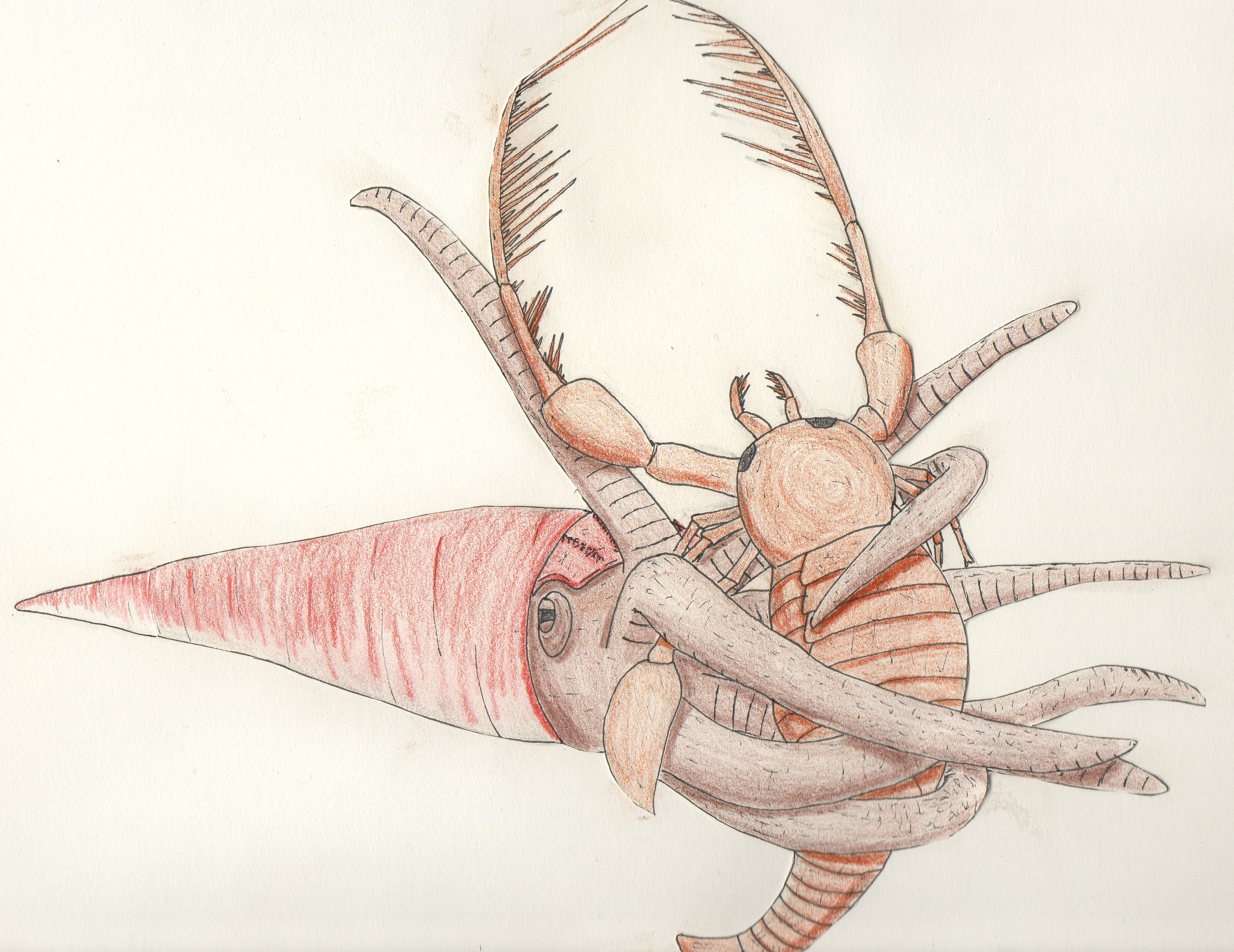 Cameroceras attaquant Megalograptus